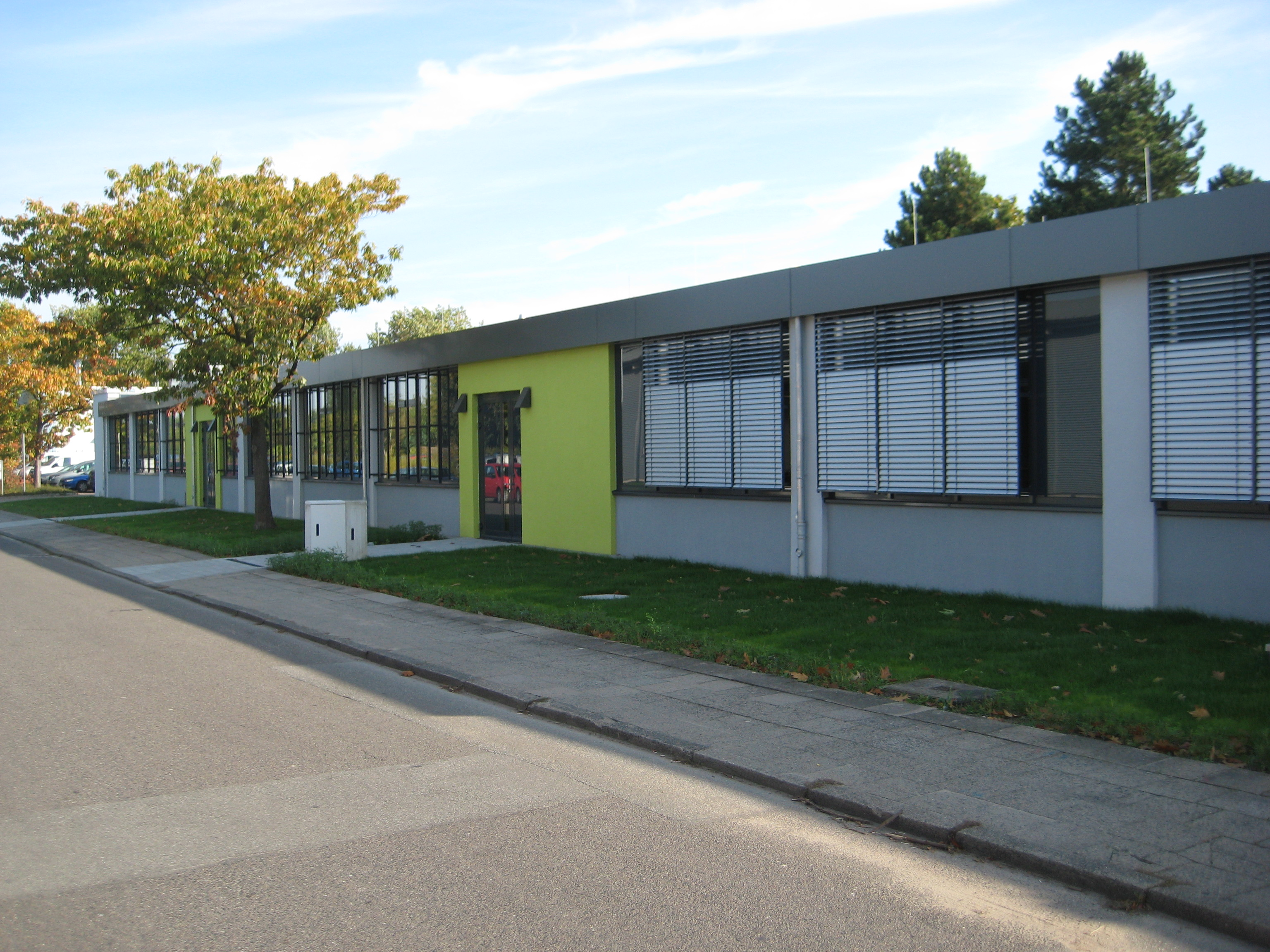 Ansicht 3 Fachhochschule Lübeck